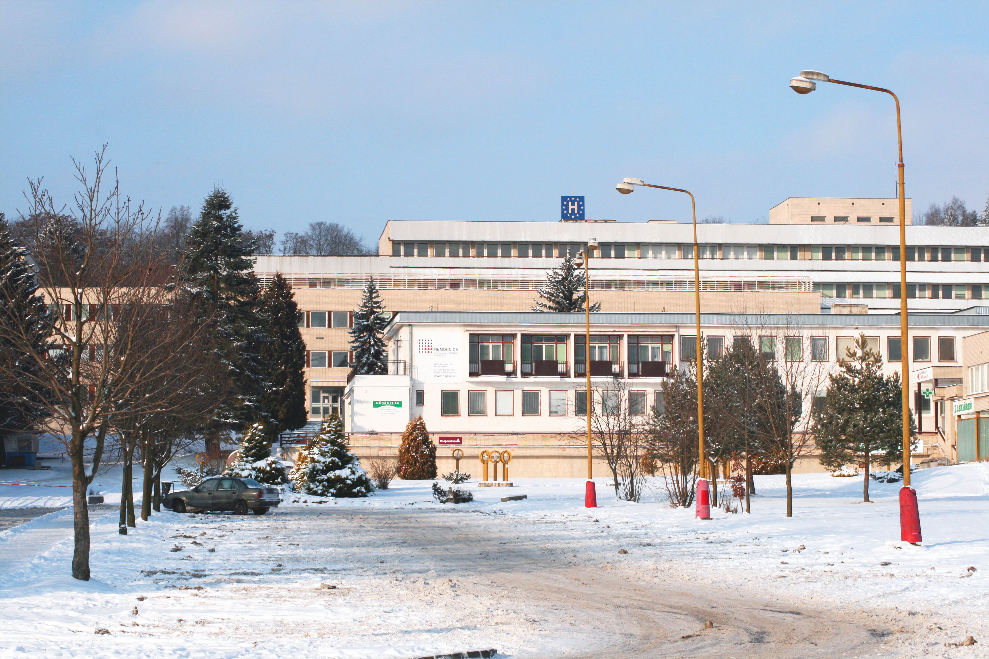 Svidnicka nemocnica armádneho generála Ludvíka Svobodu s poliklinikou